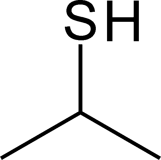 異丙硫醇的結構